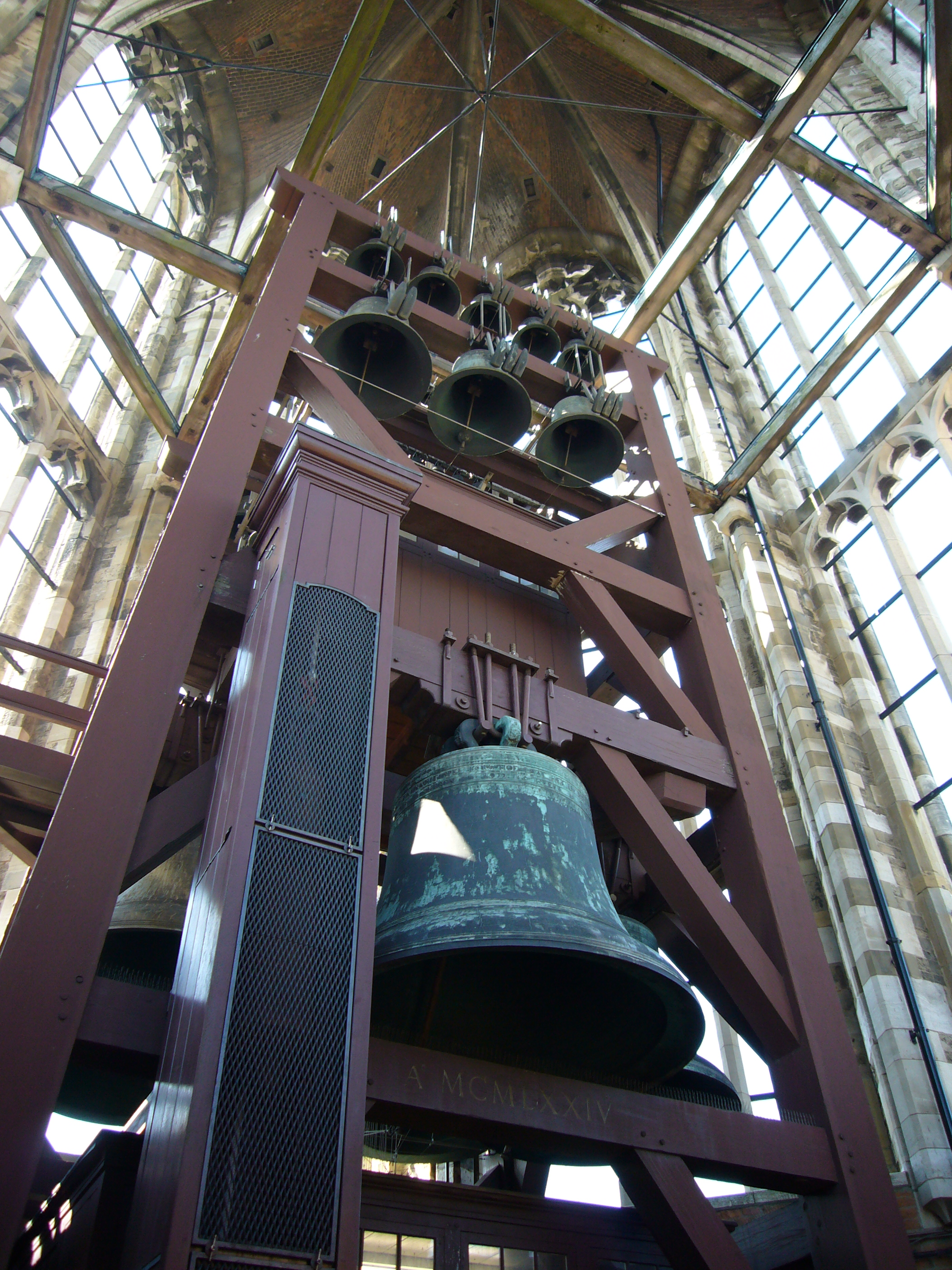 Beiaard van Pieter en François Hemony in de Dom te Utrecht